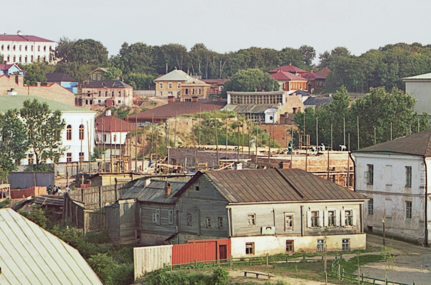 Беларуская (тарашкевіца): Віцебск (Viciebsk). Замак, рэшткі